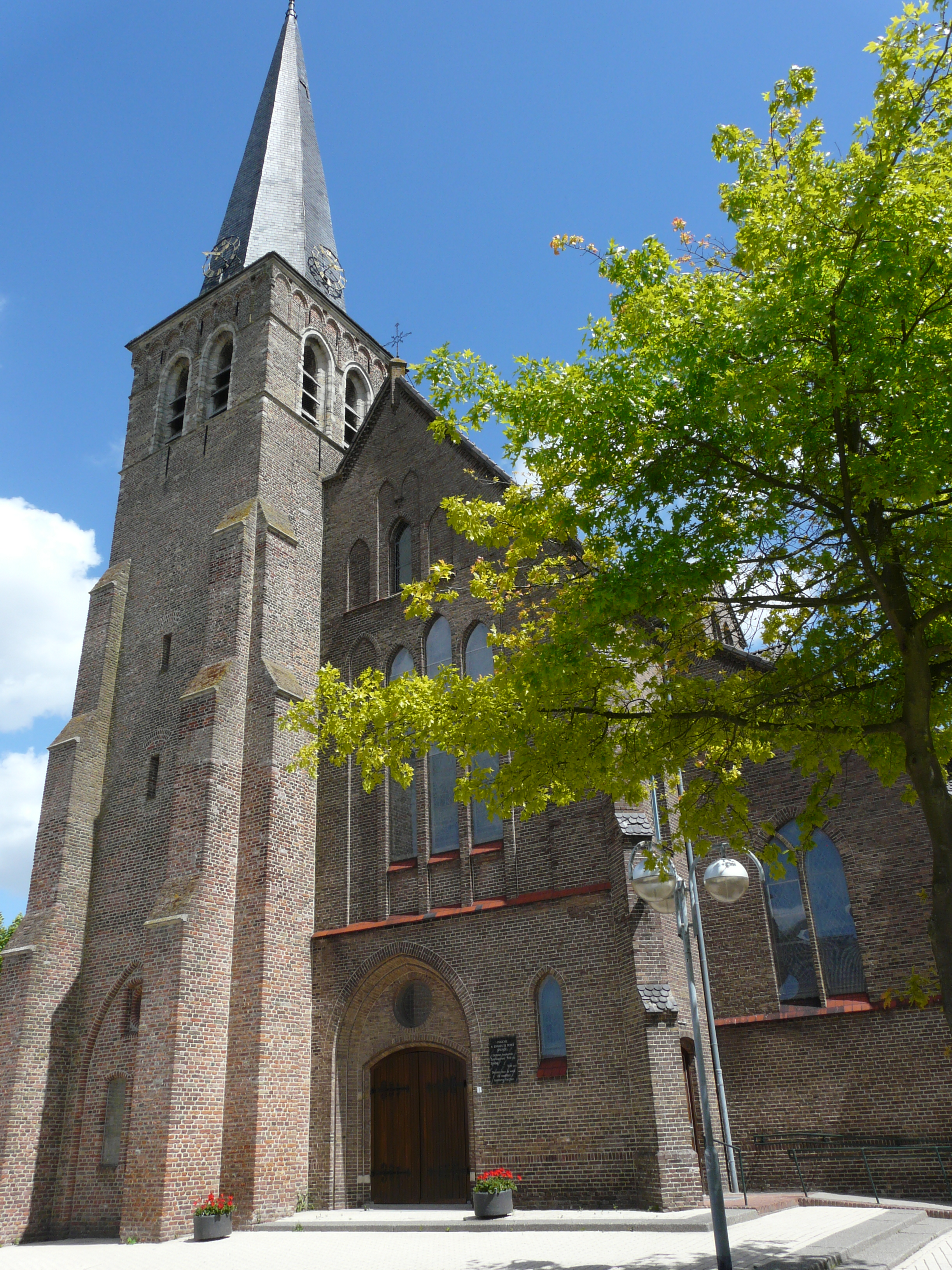 Zicht op een deel van de Johannes de Doperkerk (Sprundel) in Sprundel